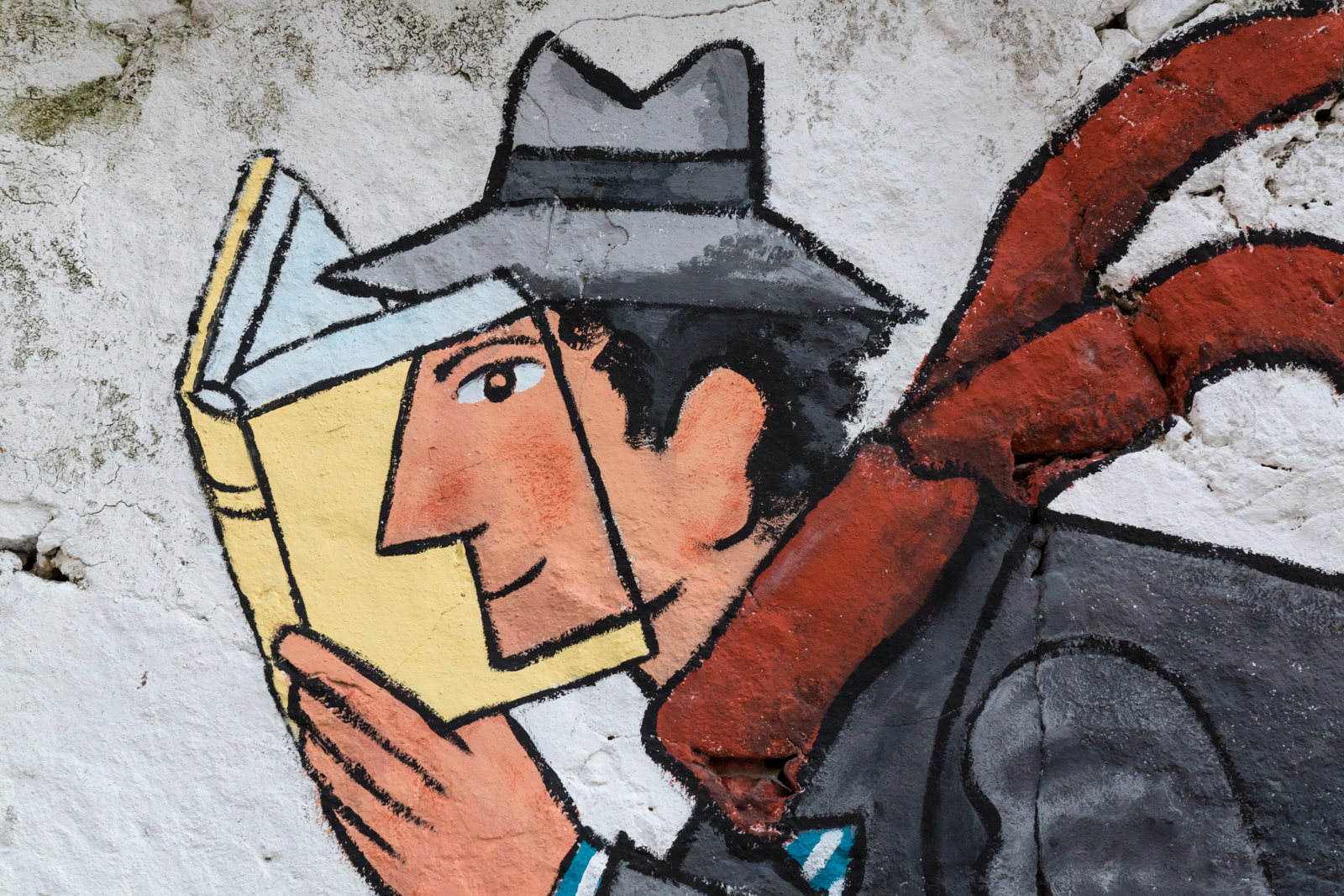 OPO - 20150910 - 114